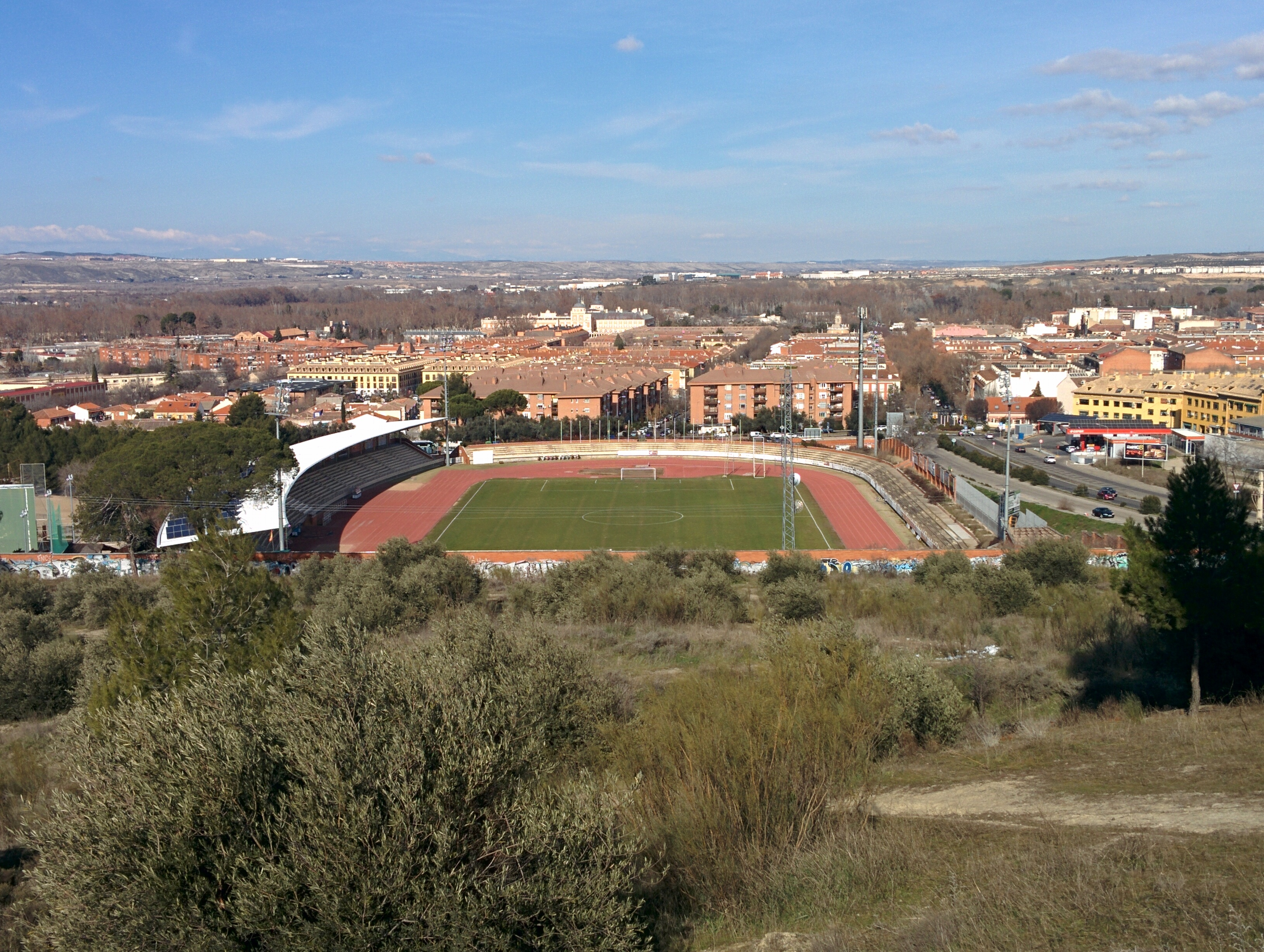 Estadio Municipal El Deleite, en Aranjuez (Madrid, España).